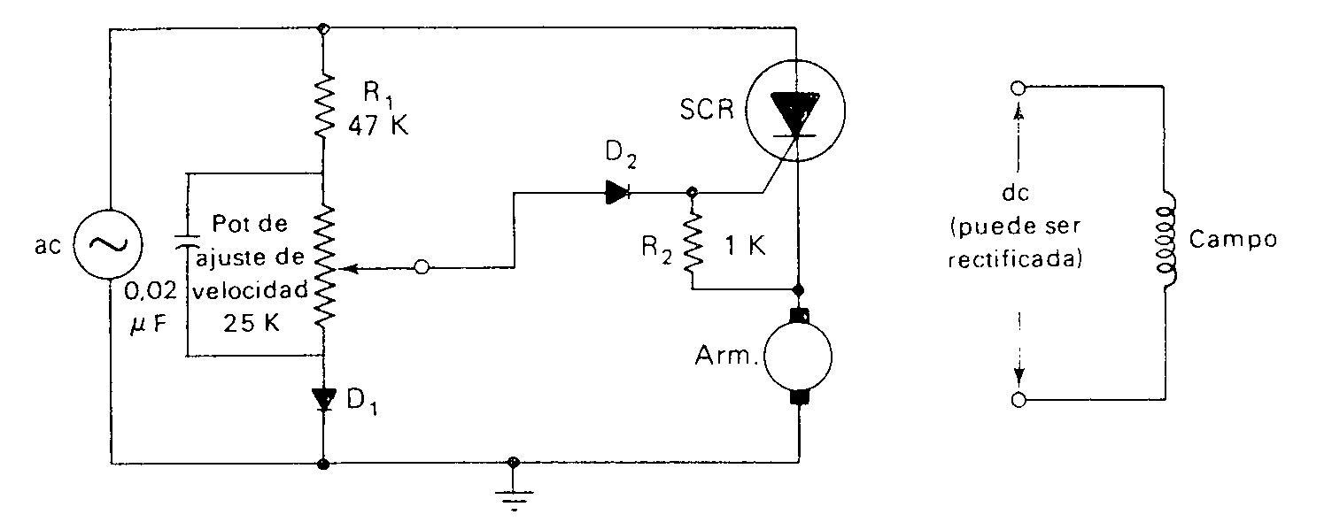 Esquema de un arreglo electronico que proporciona el control de un motor CD.